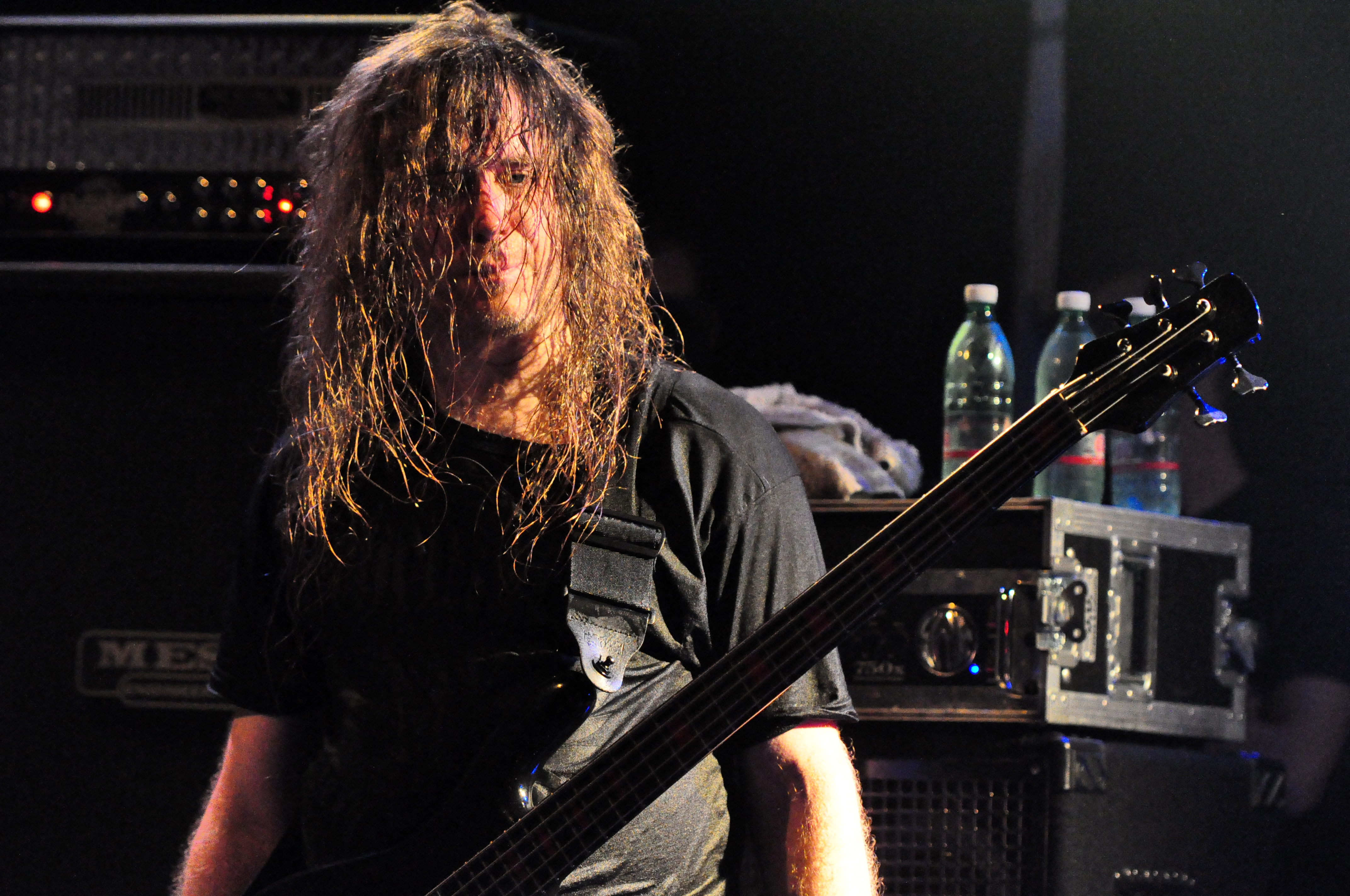 Alex Webster in Rostock, 2012